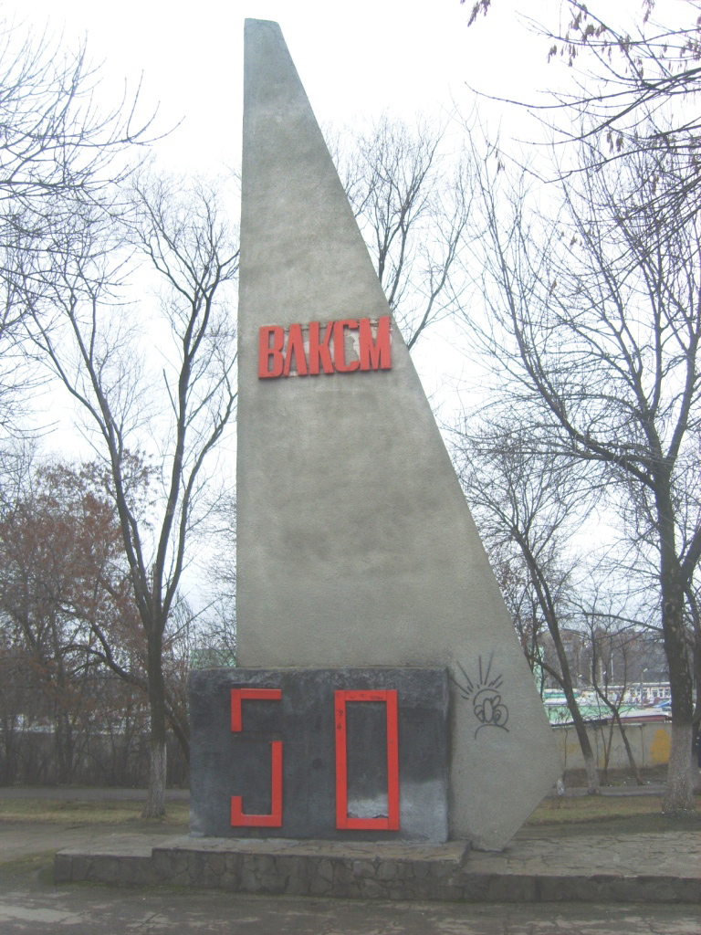 Стела «50 лет ВЛКСМ» воздвигнута в 1968 году у Дворца Культуры имени Ленина. Стела кирпичная, оштукатуренная цементным раствором. Постамент также кирпичный, оштукатуренный.